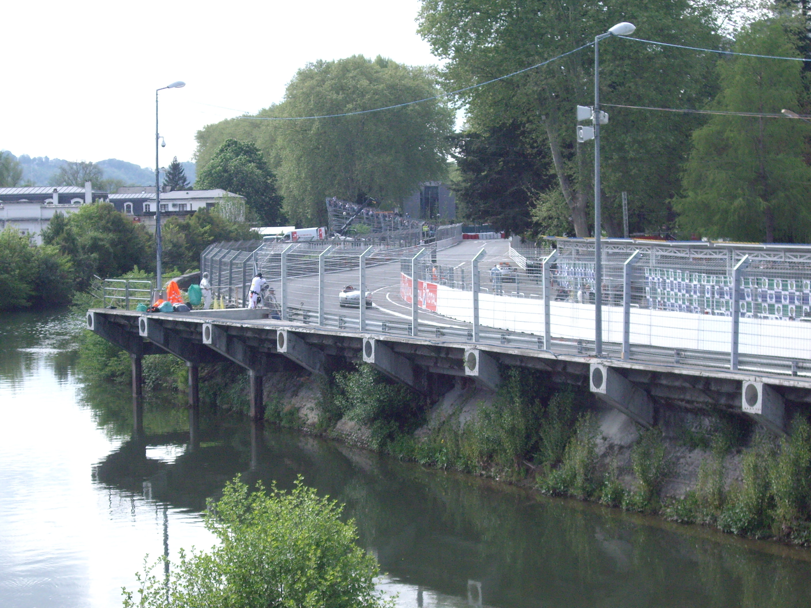 Photo GP de Pau Historique 2012